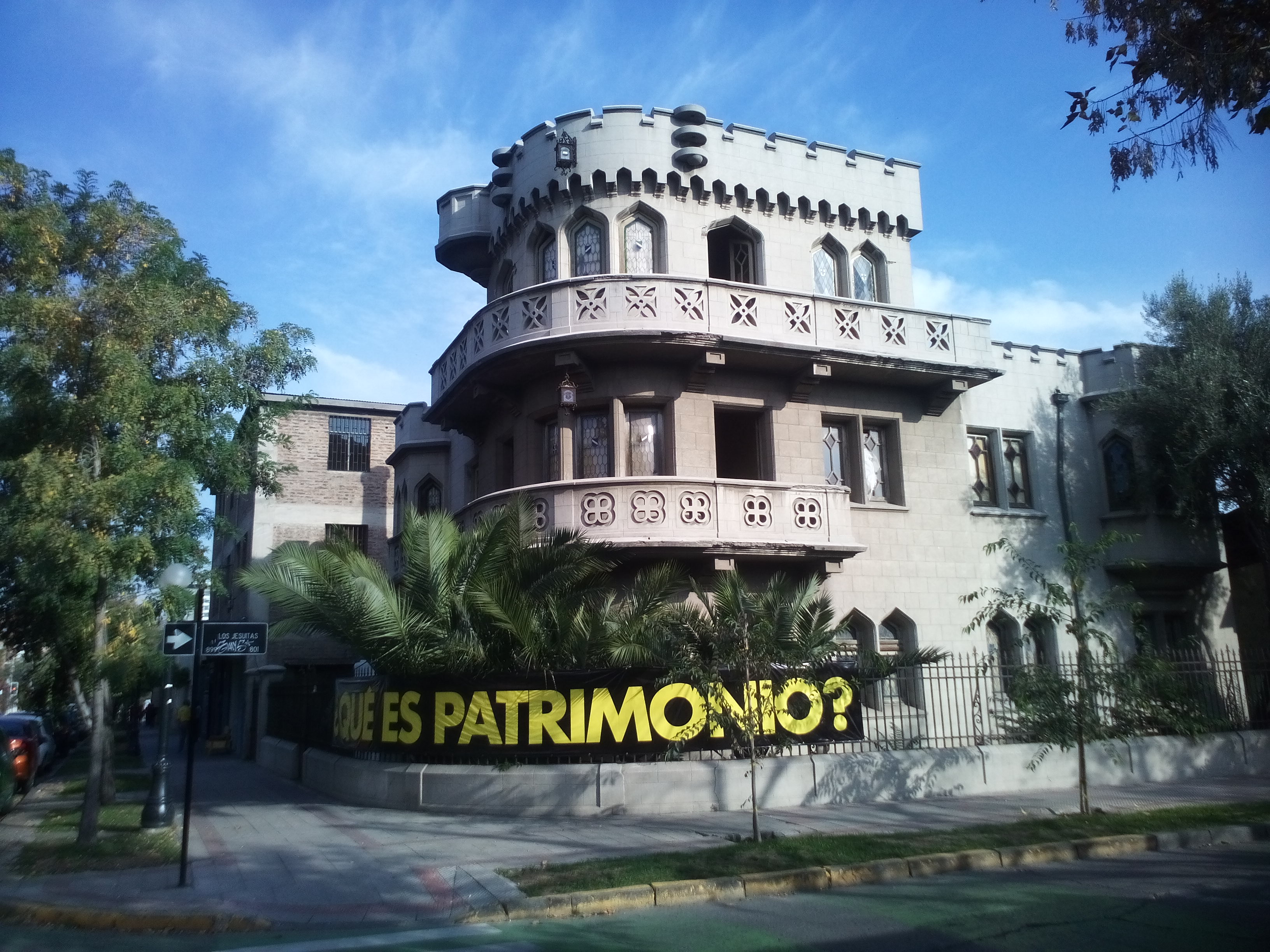 Edificio patrimonial de la comuna de Providencia